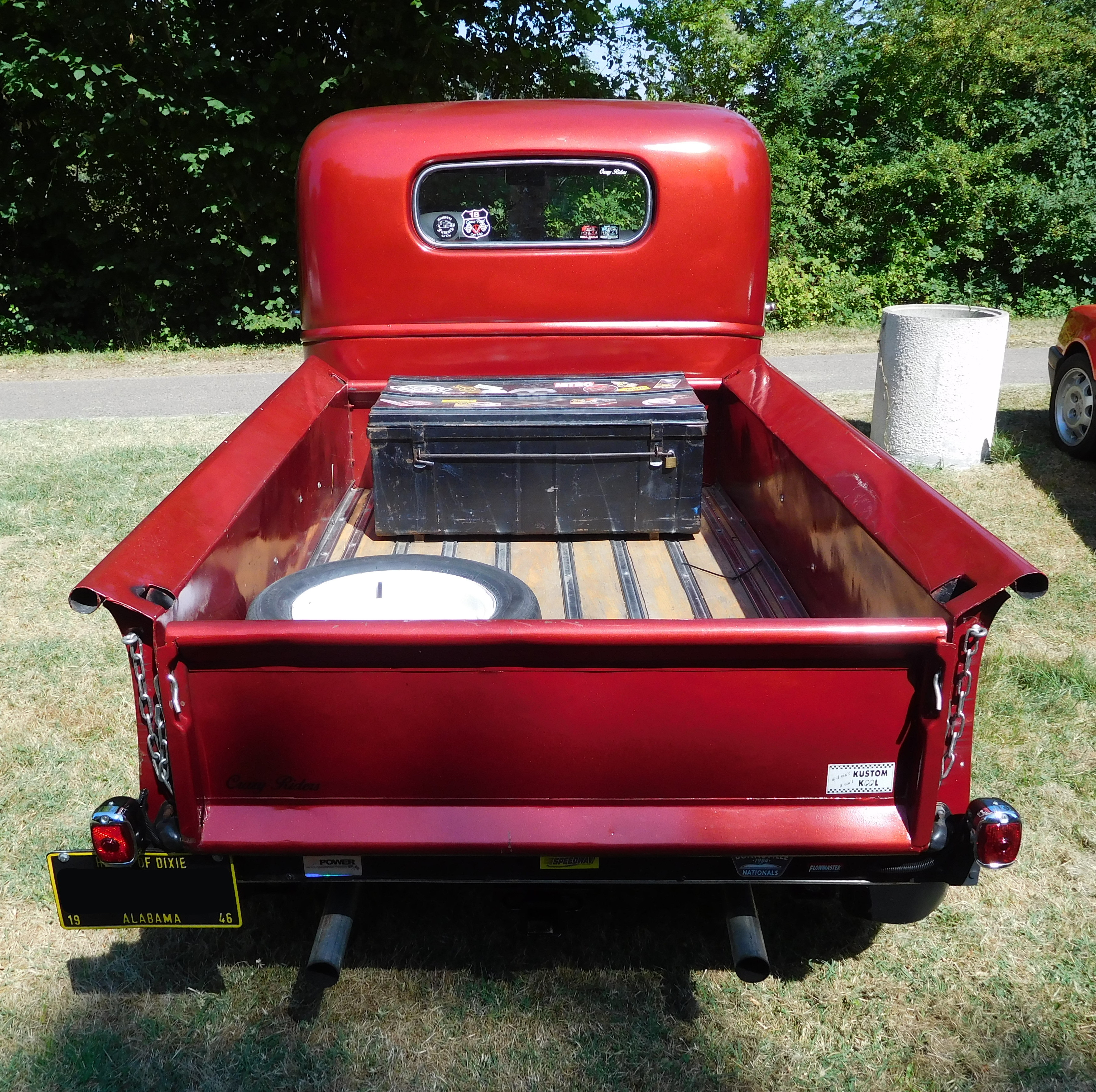 Pickup GMC de 1946. Bagage : une cantine (meuble de voyage) est visible dans le coffre. Exposition de véhicules, promenade de Berry, Jouet-sur-l'Aubois, Cher, France.